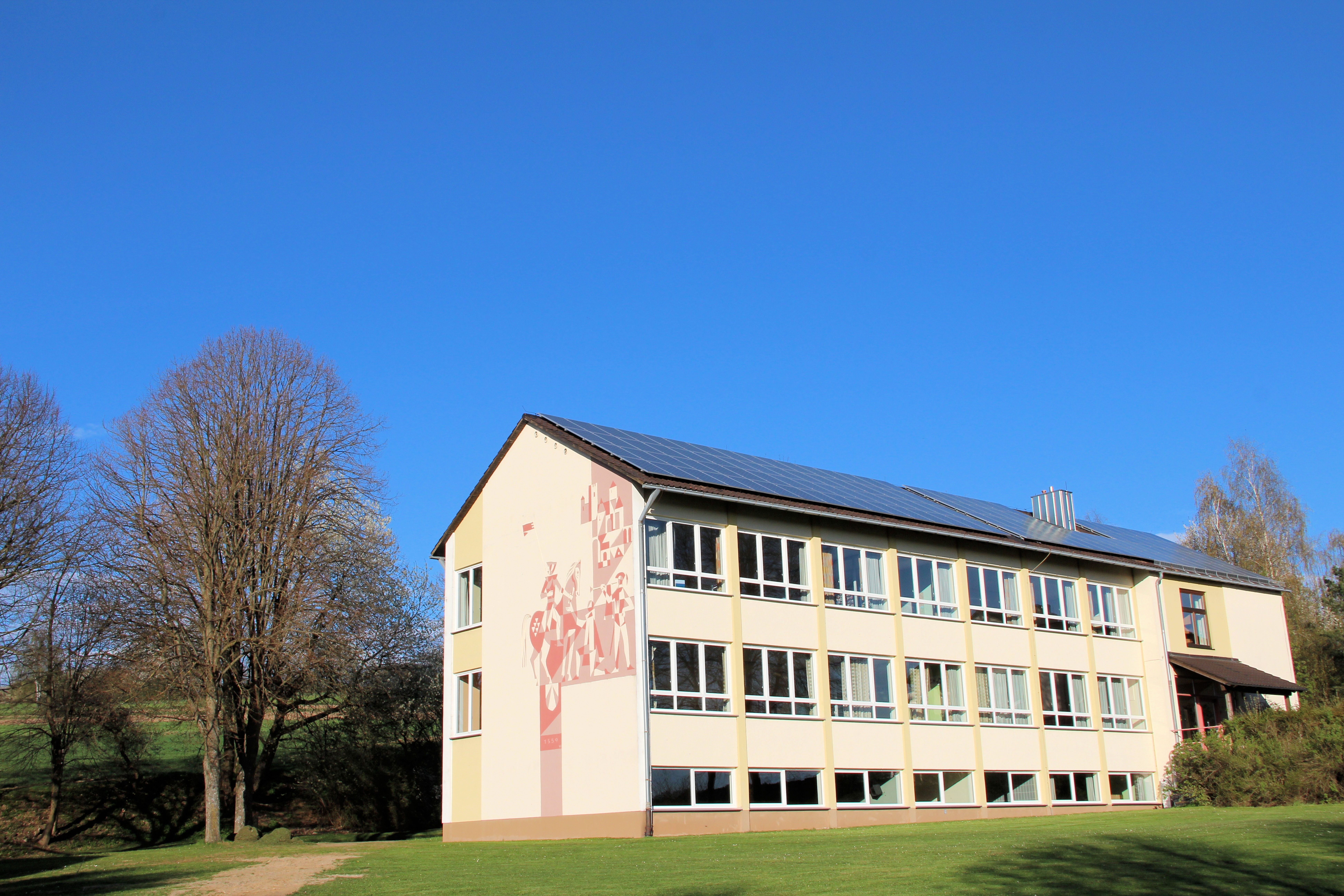 In den Jahren 1965 bis 1967 entstand in der Sandgasse ein neues Schulhaus mit vier Klassenräumen, einer kleinen Turnhalle im Kellergeschoss und einem Wohngebäude für Lehrkräfte. Aufgrund rückläufiger Schülerzahlen wurde der Unterrichtsbetrieb in Gleiritsch im Jahre 2008 eingestellt. Heute erfolgt der Unterricht in Teunz (Grundschule) und in Oberviechtach (Mittelschule). Das Gebäude soll in den nächsten Jahren komplett saniert werden: Gemeinde Gleiritsch, Landkreis Schwandorf, Oberpfalz, Bayern